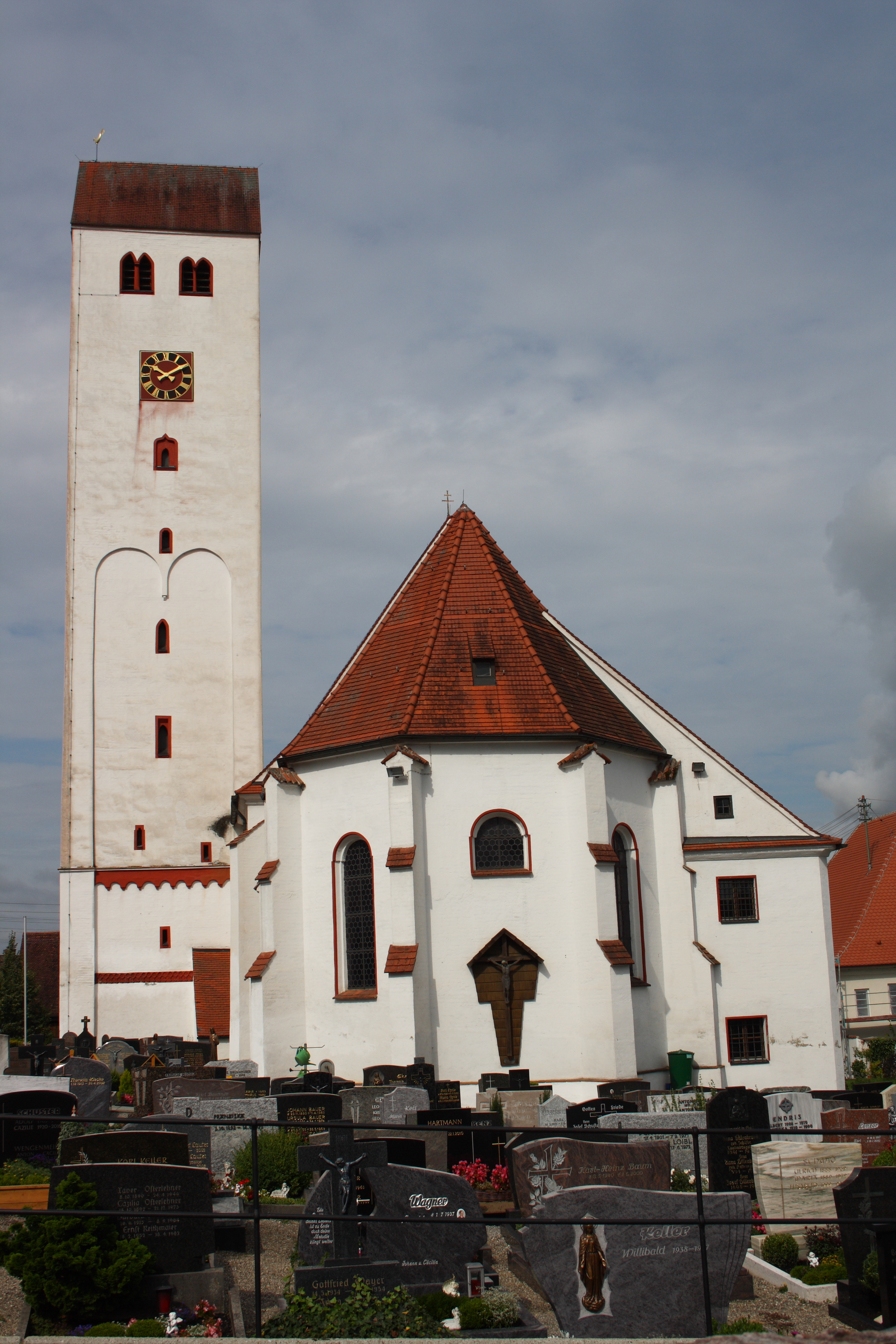 Katholische Pfarrkirche St. Georg in Aislingen im Landkreis Dillingen an der Donau (Bayern), Ansicht von Osten, Apsis und Satteldachturm